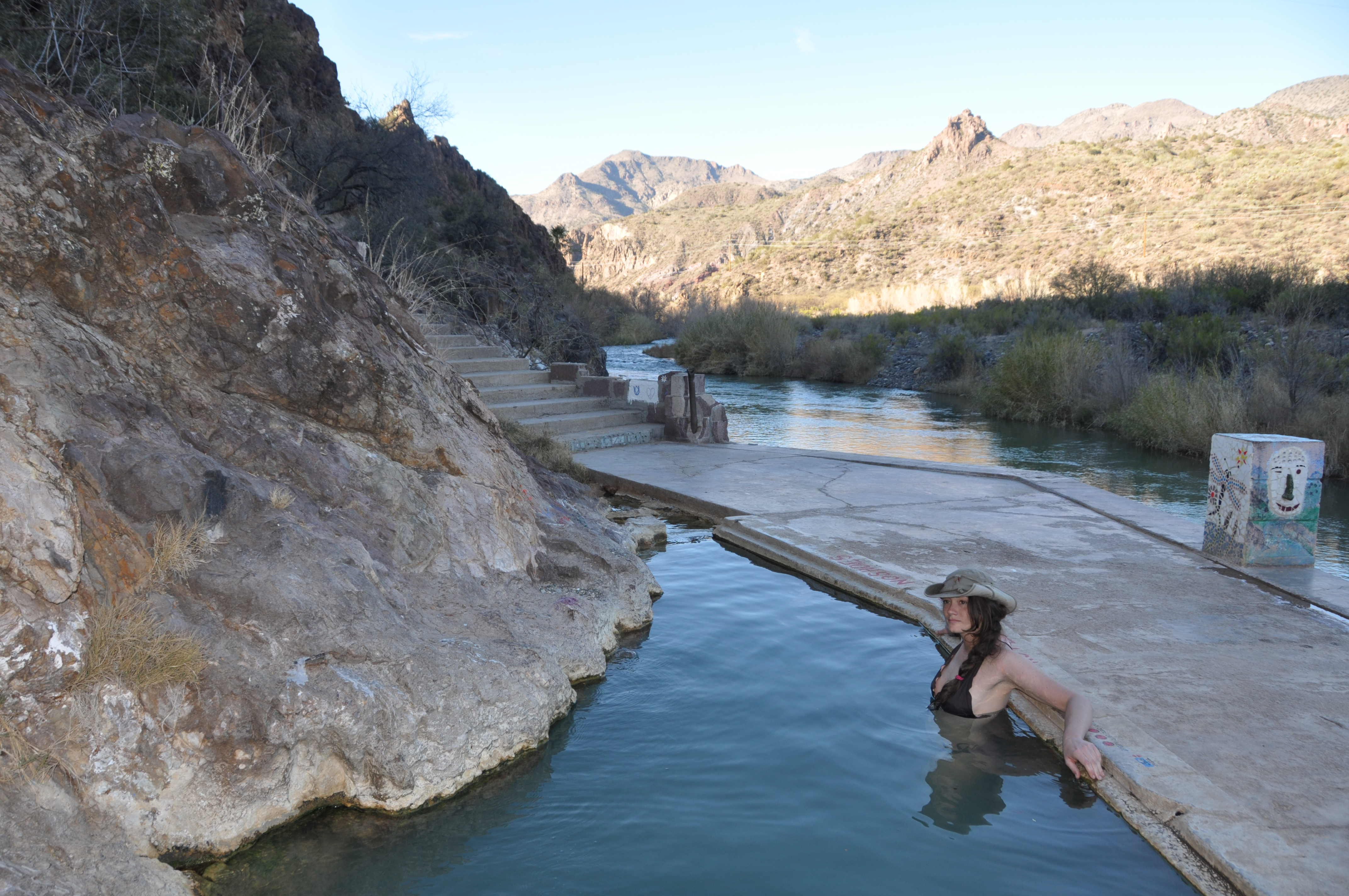 Verde Hot Springs, photo by Greg Walters